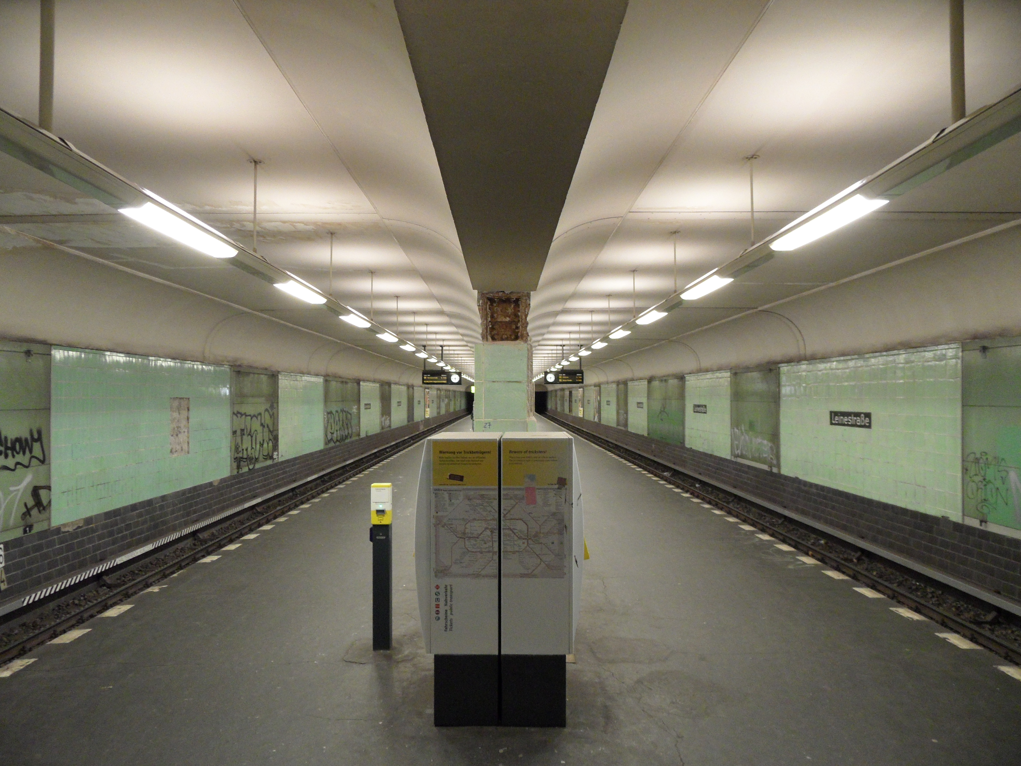 Berlin - U-Bahnhof Leinestraße - Linie U8